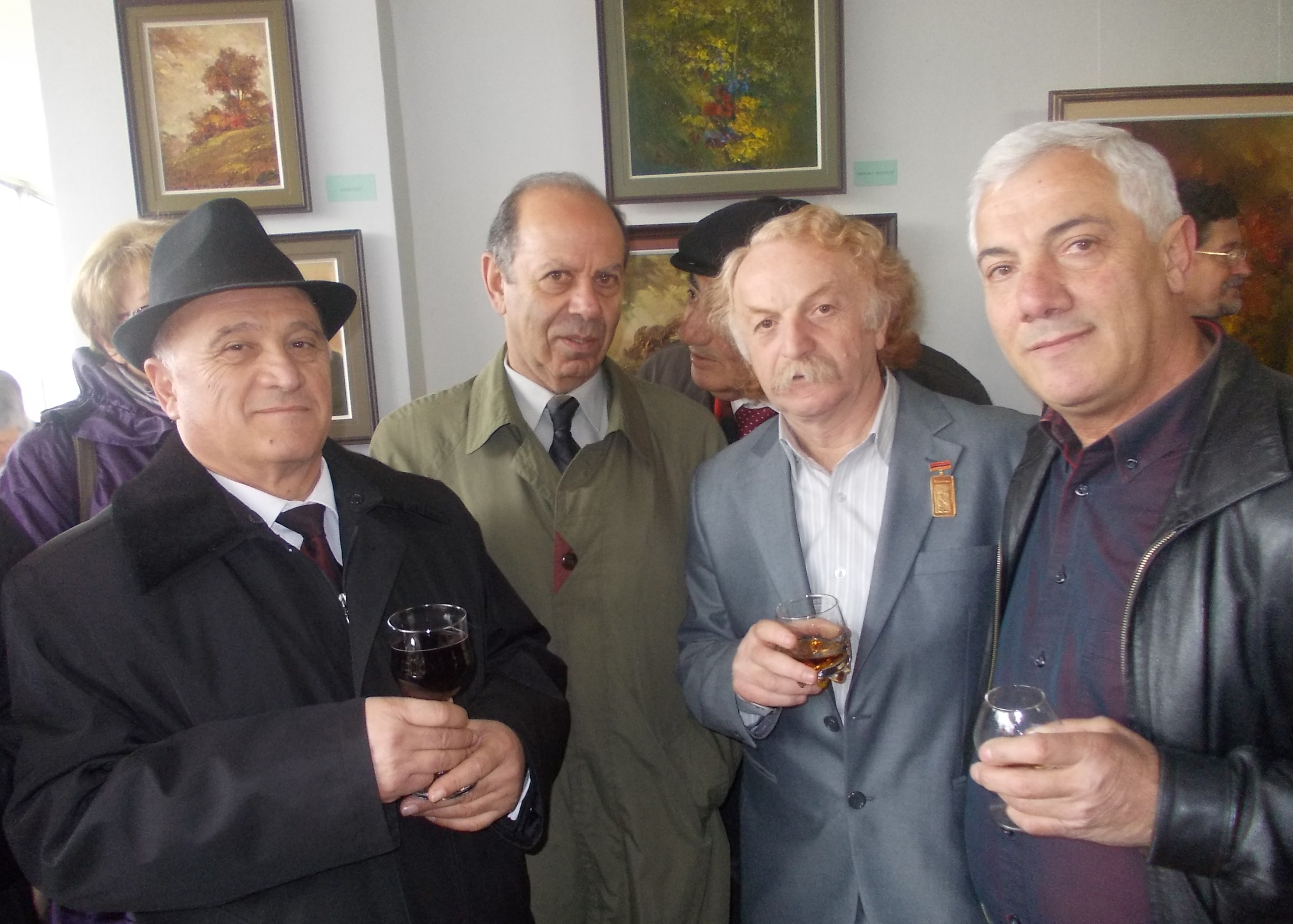 ԱԼՓԱ և ընկերներ, 2011